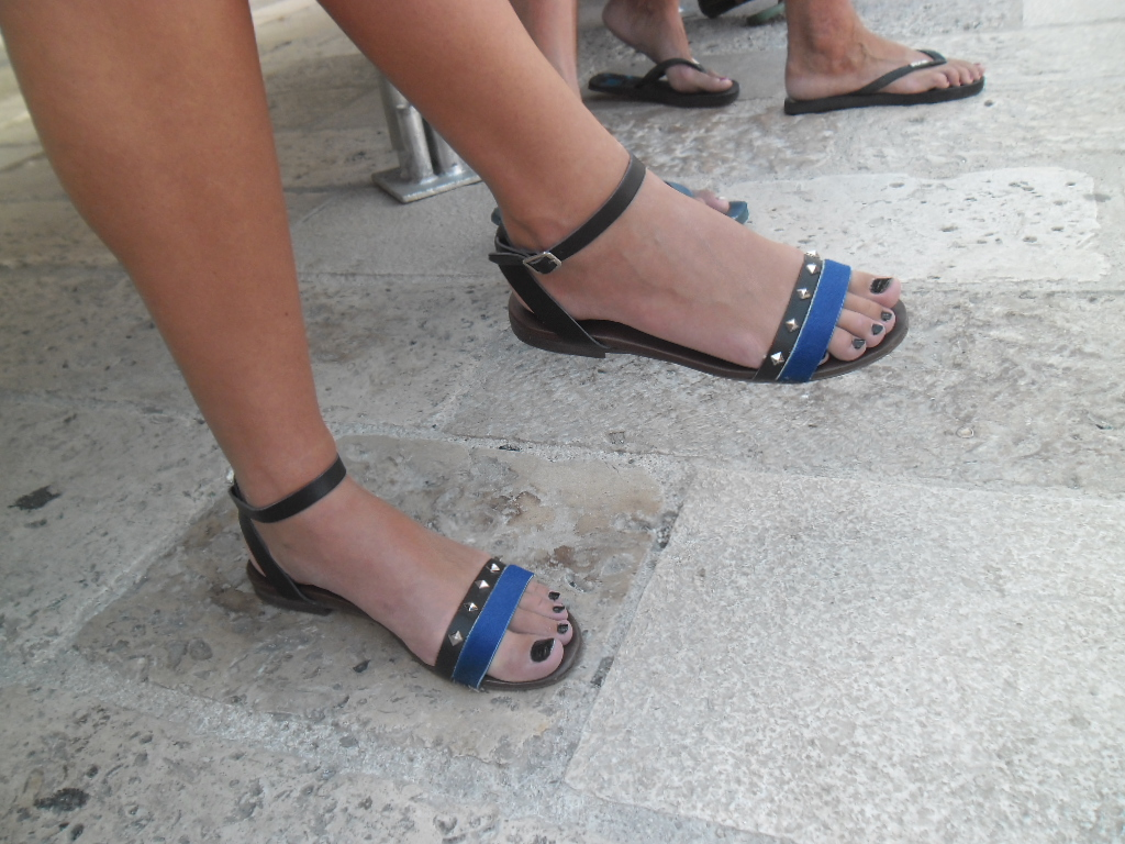 ženska stopala